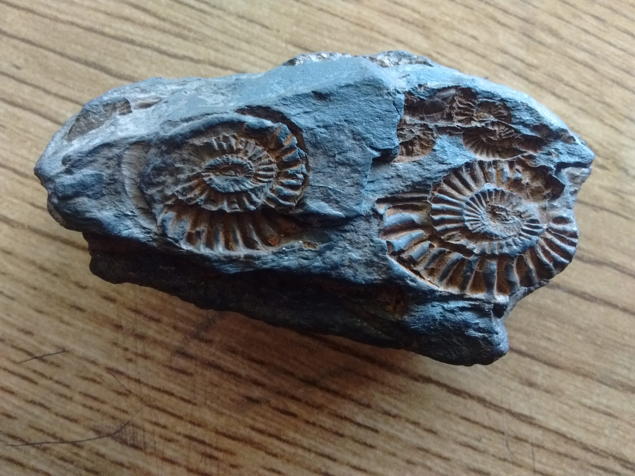 Fósil de un molusco